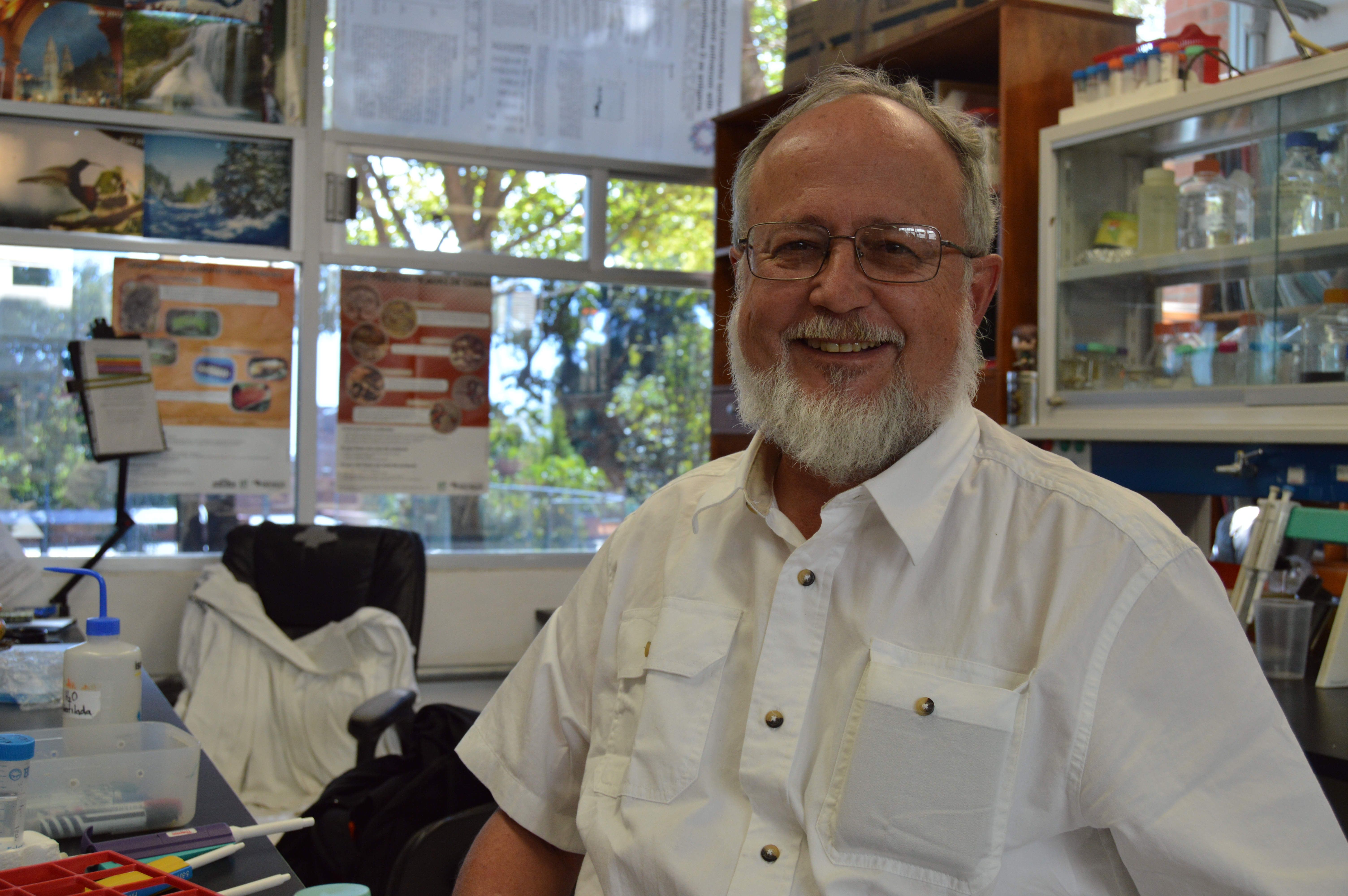 El doctor Alejandro Alagón Cano, investigador dedicado al mejoramiento y desarrollo de antivenenos en el Departamento de Medicina Molecular y Bioprocesos del Instituto de Biotecnología de la Universidad Nacional Autónoma de México (UNAM), en su oficina.